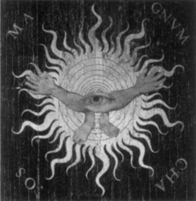 0.2 chaos magno